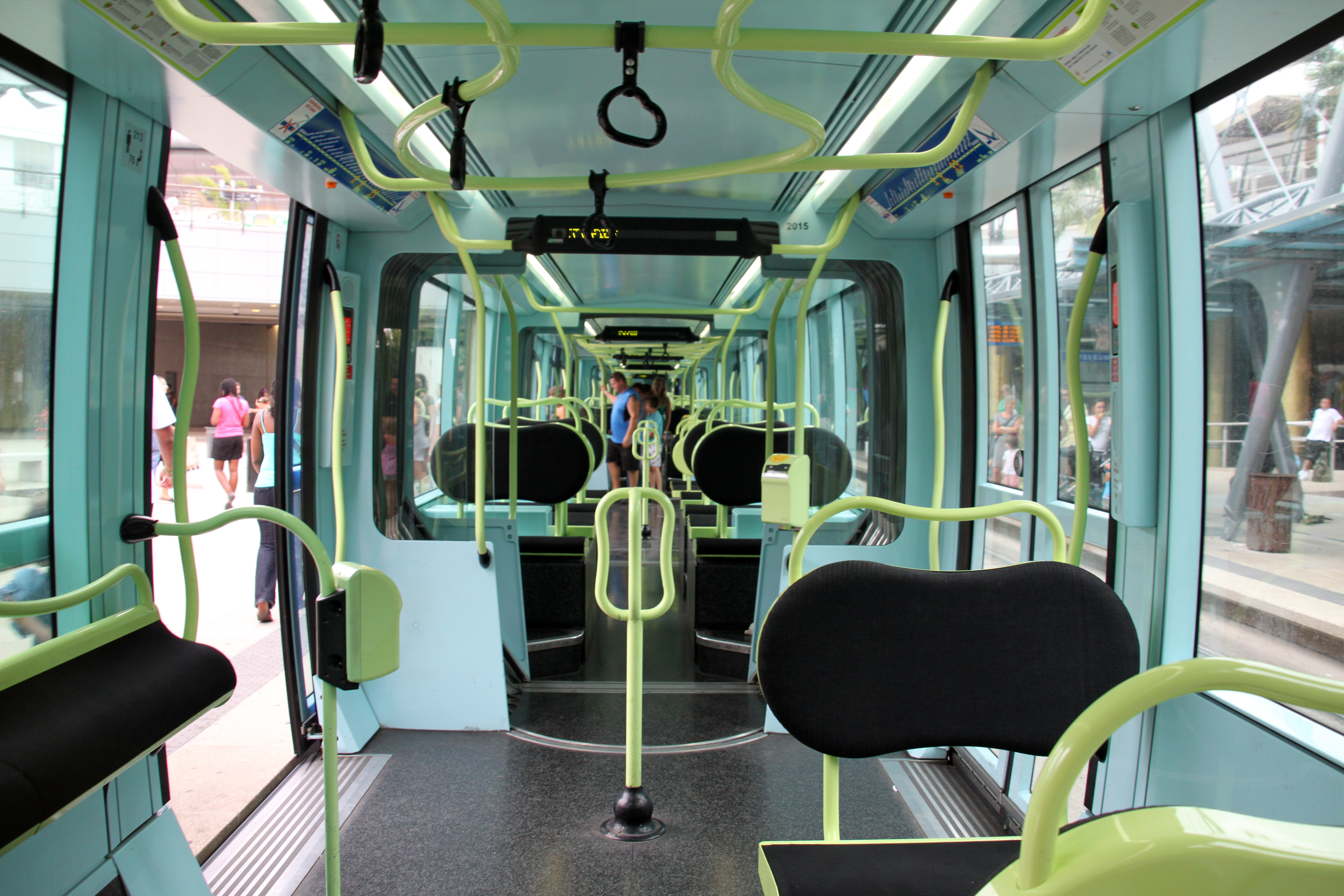 Interieur van een Citadis 401 in Montpellier zonder reizigers.